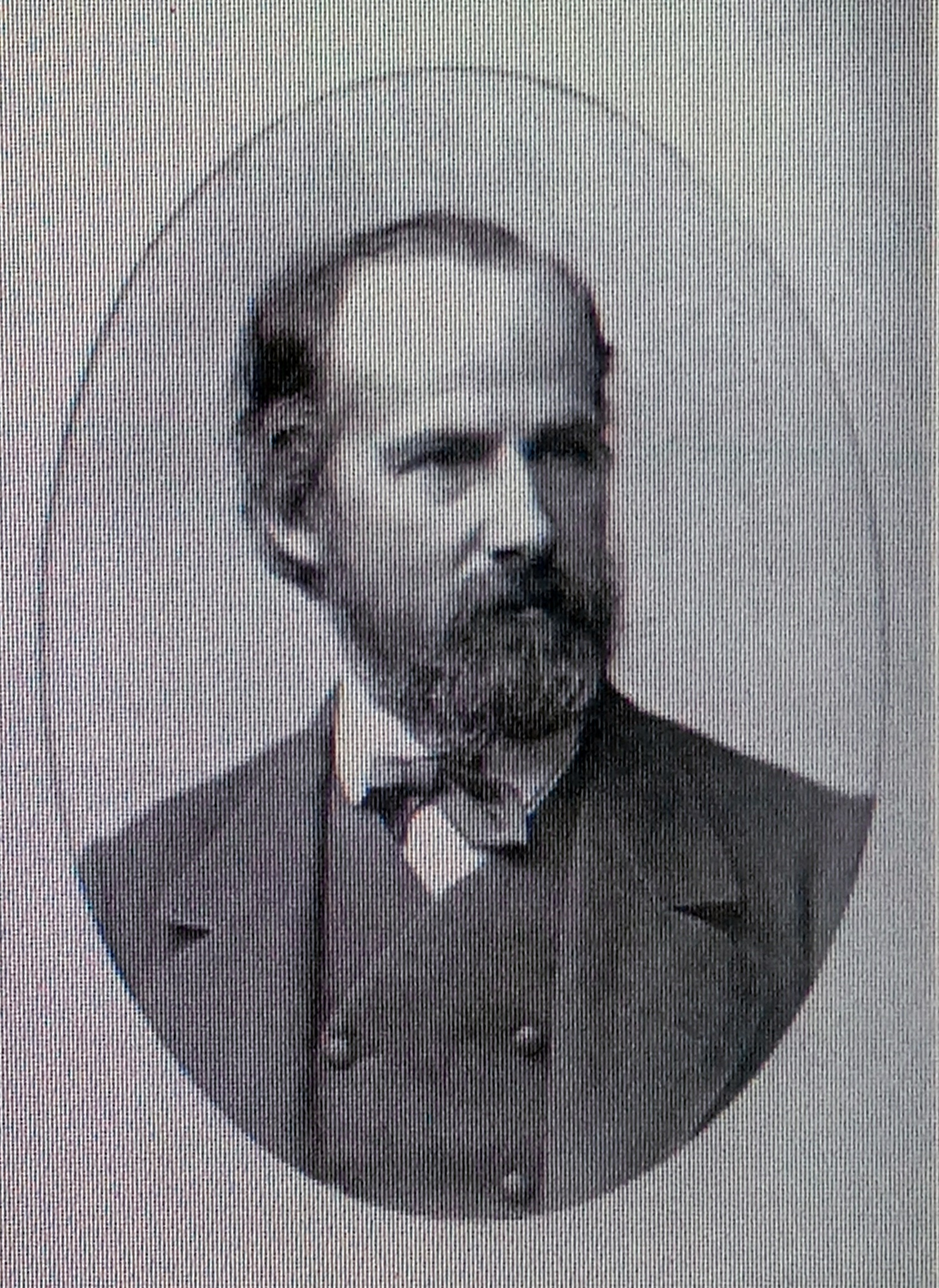 Friedrich Eppelsheim (1834-1899) Richter und Schmetterlingsforscher in Grünstadt